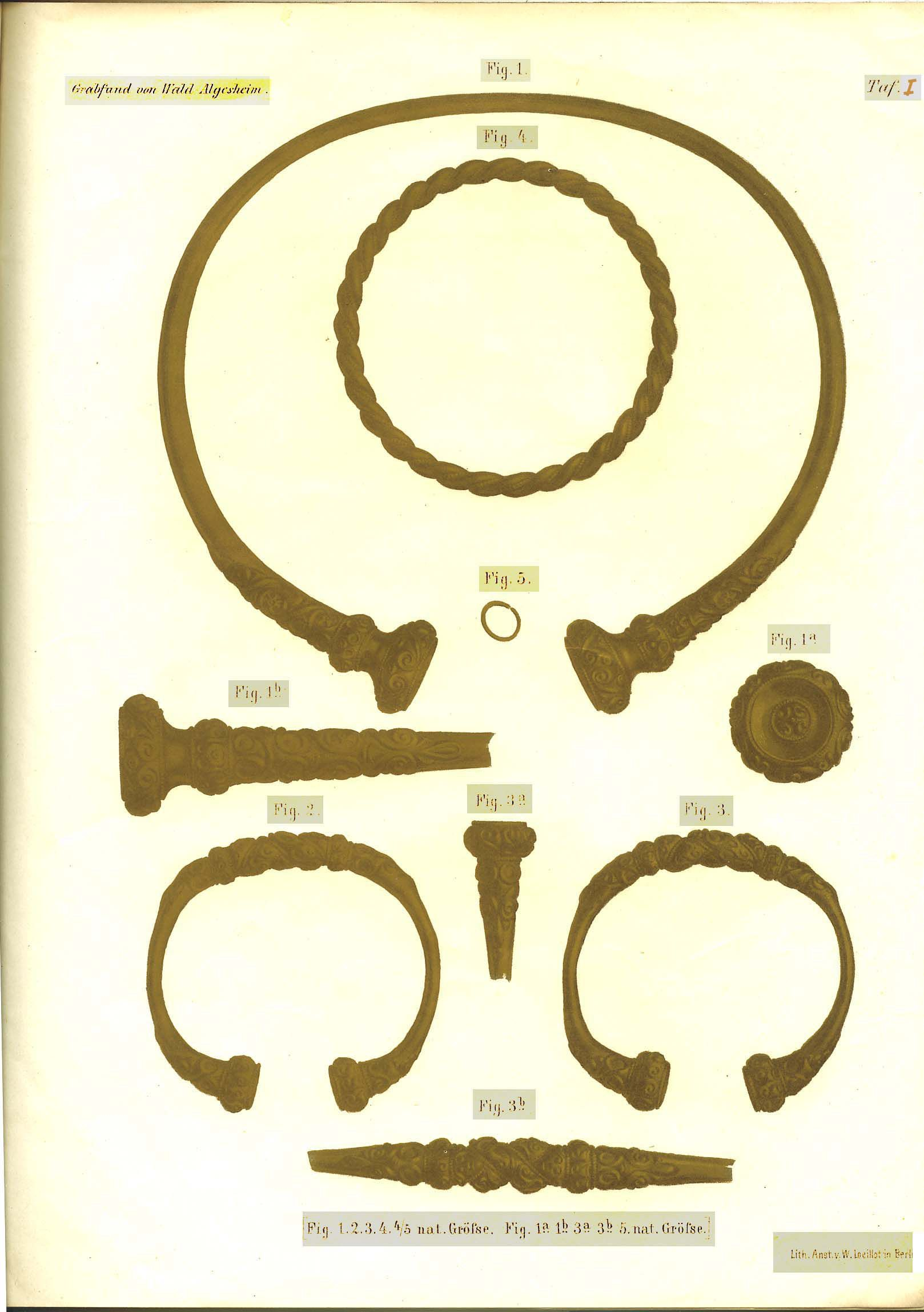 Grabfunde des Waldalgesheimer Fürstengrabes